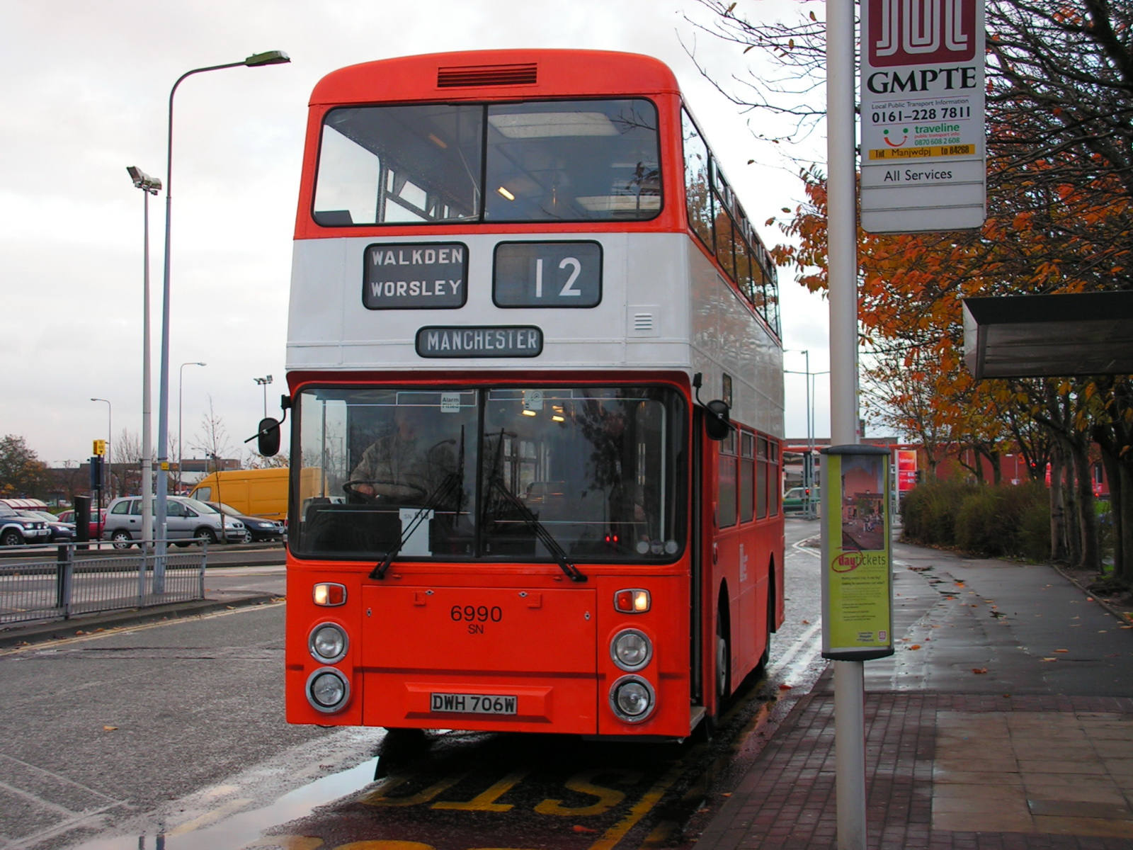 2006-11-12 2006-11-12 lut 6990 dwh706w bn a.Jpg